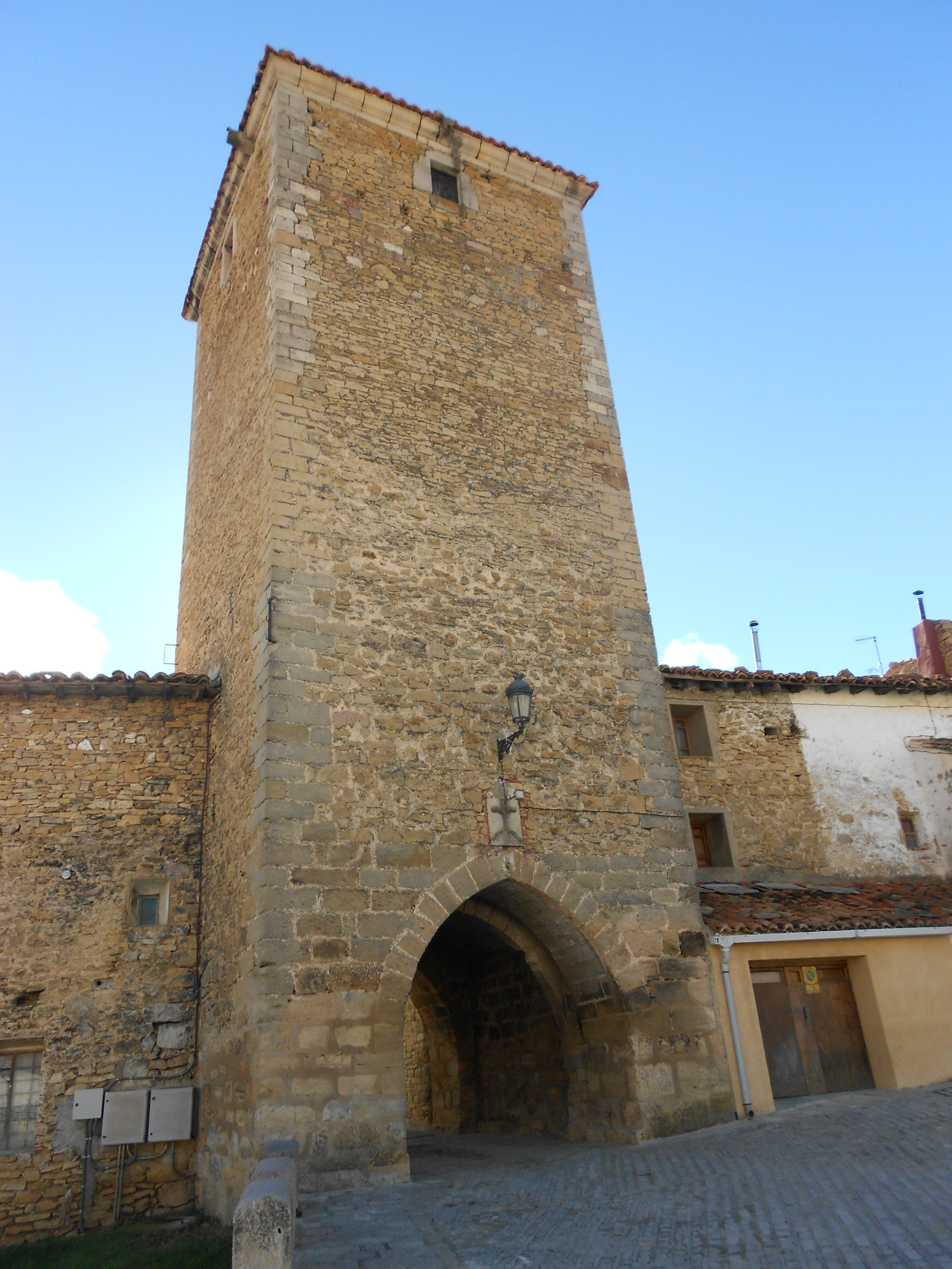 Portal de San Roque (Mosqueruela, España)